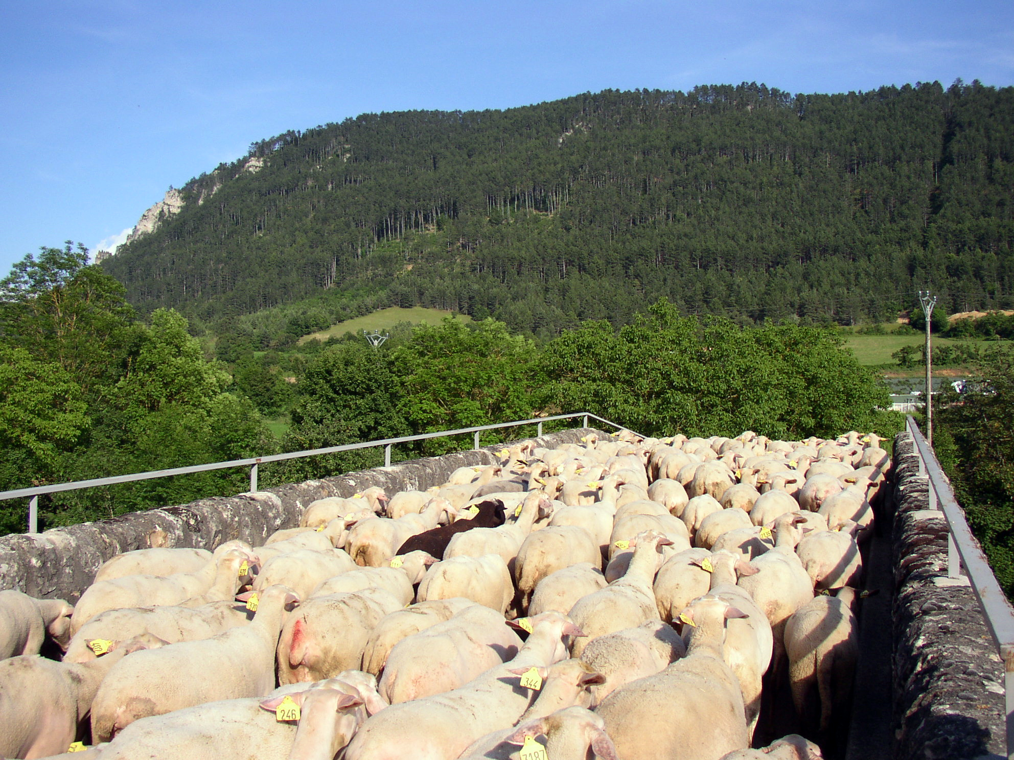 Lepont d'Esclanèdes traversé par des moutons